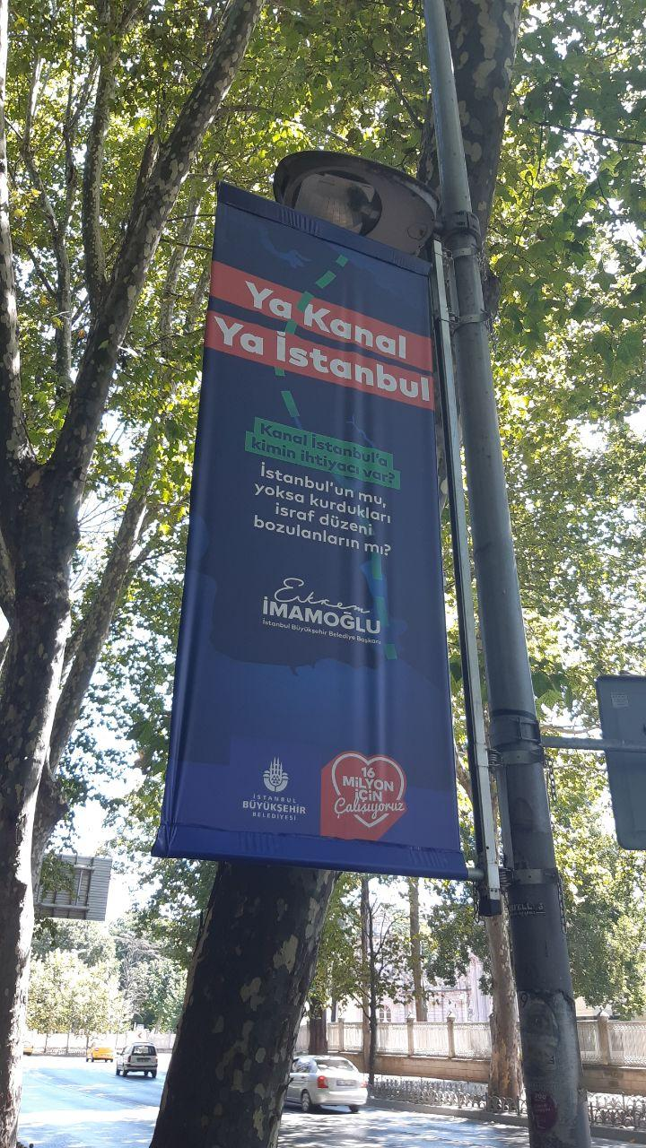 İstanbul Büyükşehir Belediyesi tarafından asılan Kanal İstanbul afişleri